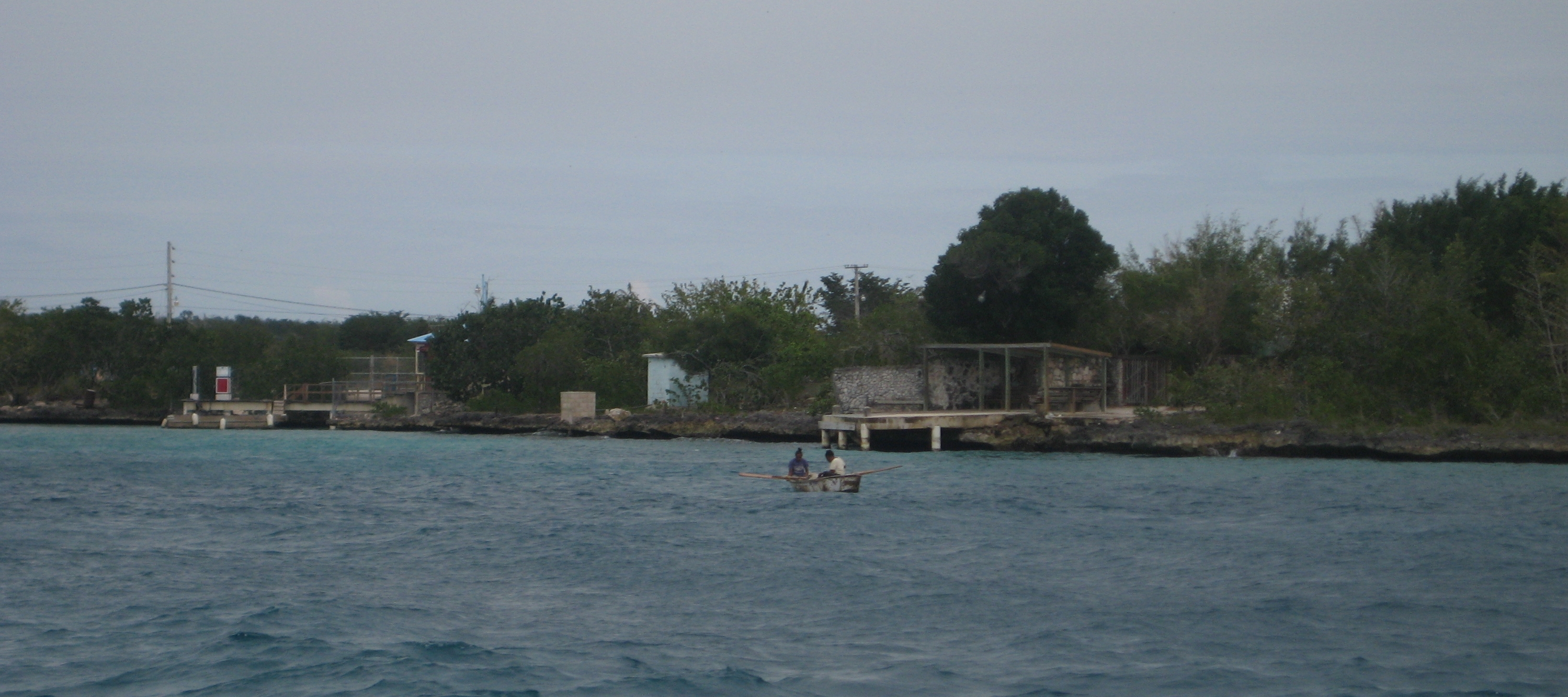 Embarcaderos en el Puerto de Bayahibe